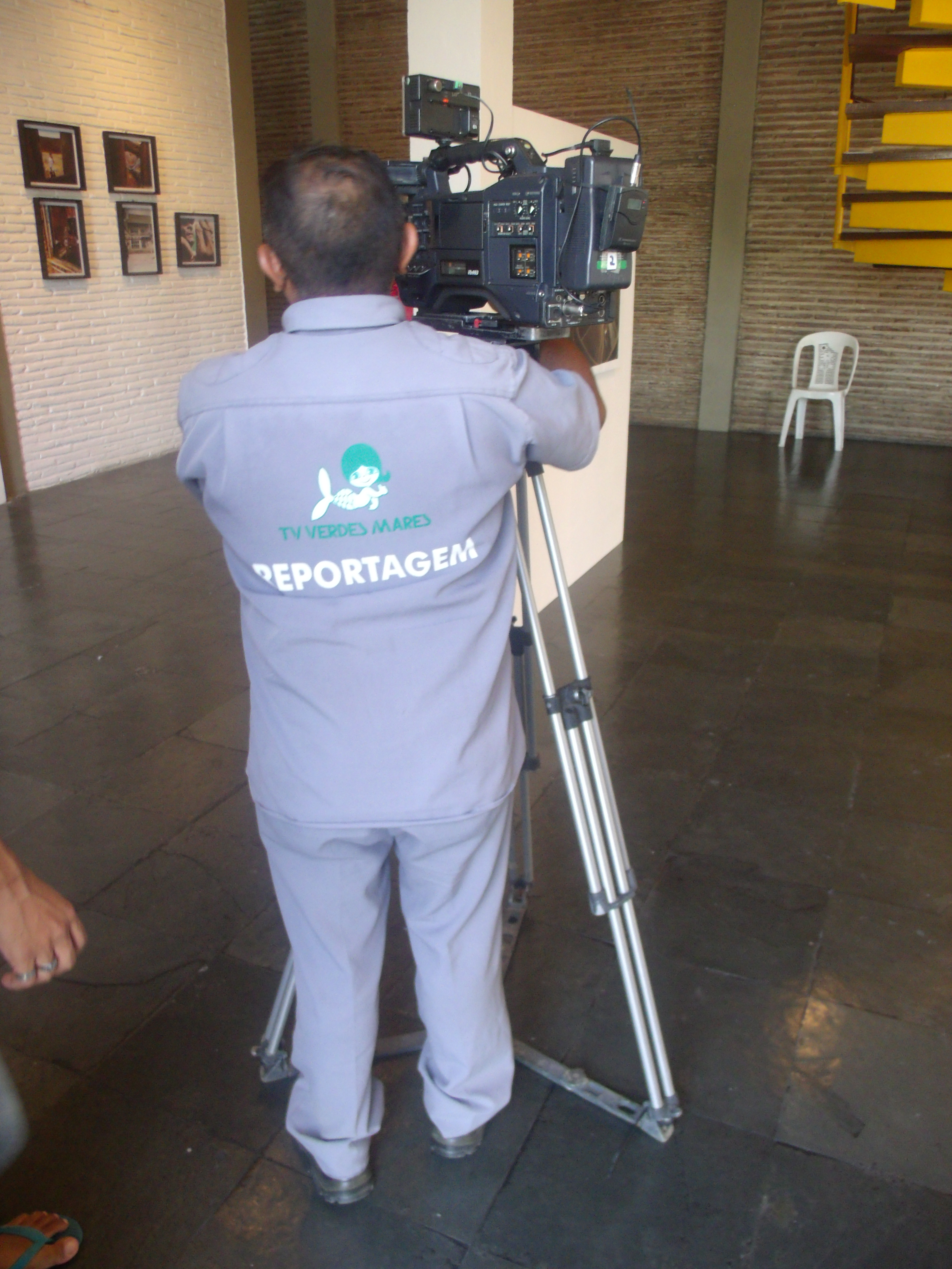 Cinegrafista da TV Verdes Mares dentro da Casa da Cultura de Sobral.